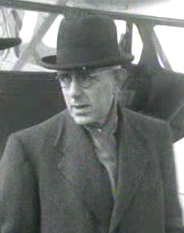 Steef van Schaik, Minister van Verkeer en Energie (1945-46)